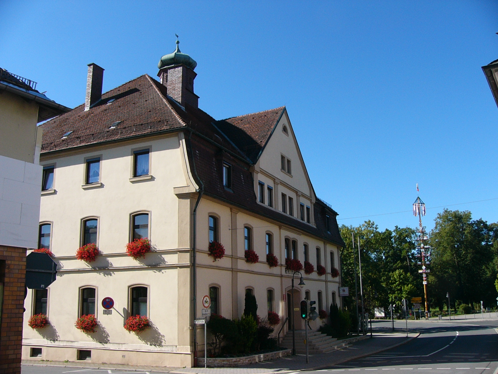 Ortsansicht Selbitz